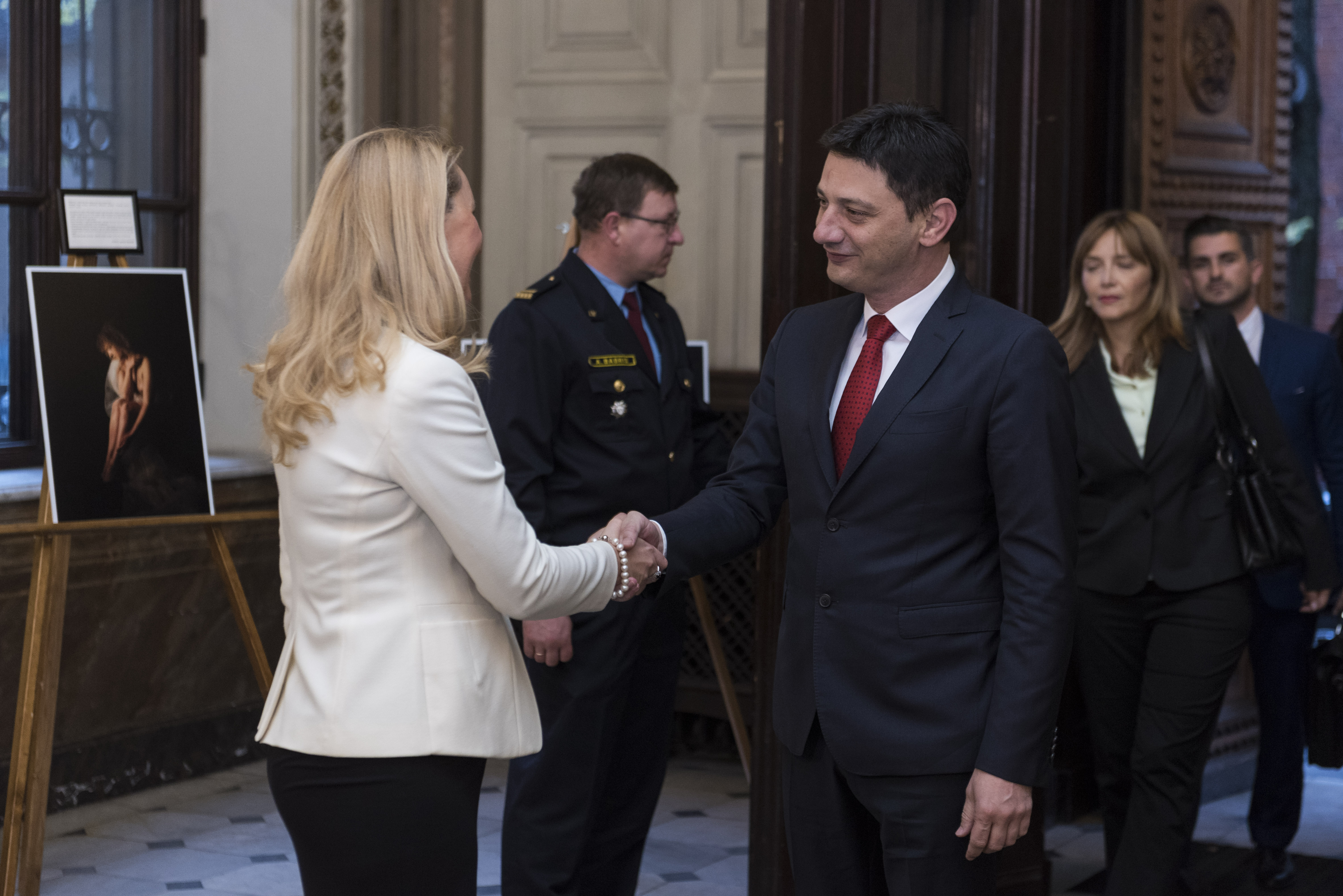 2016.gada 6.oktobris. Saeimas priekšsēdētājas biedre Inese Lībiņa-Egnere tiekas ar Melnkalnes parlamenta priekšsēdētāju Darko Pajoviču (Darko Pajović). Foto: Reinis Inkēns, Saeimas Administrācija Izmantošanas noteikumi: saeima.lv/lv/autortiesibas